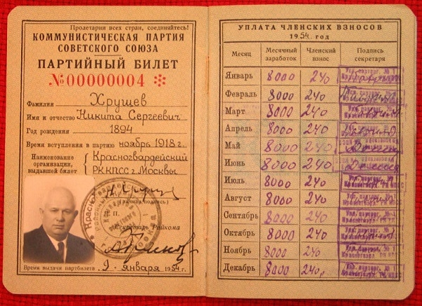 Хрущёв Никита Сергеевич, партийный билет